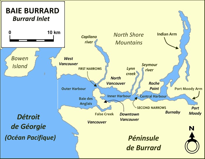 Carte de la baie Burrard en Colombie-Britannique (Canada)